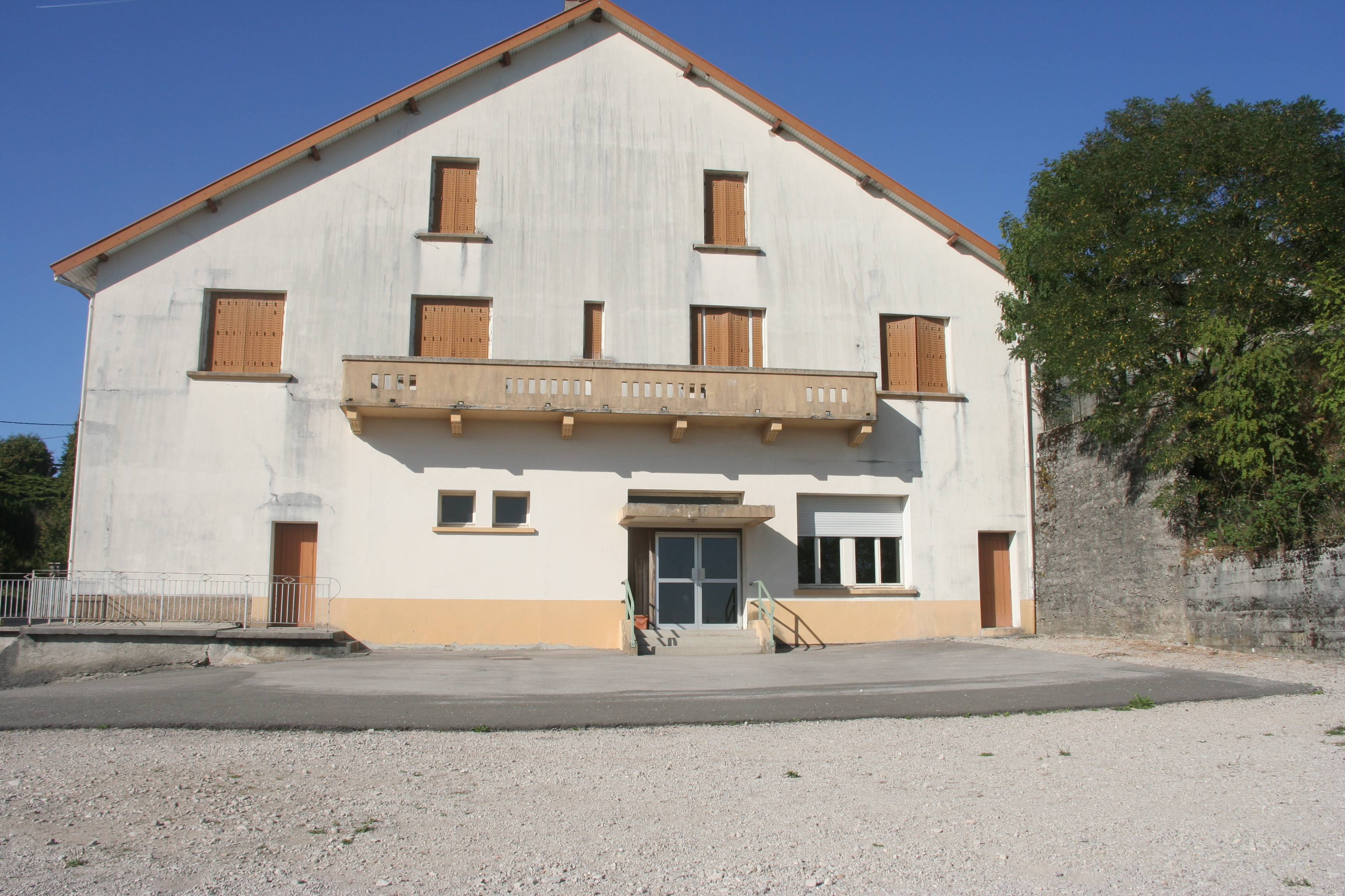 Vue de la face principale de la salle des fêtes de Crotenay